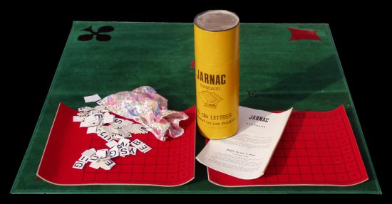 Jarnac est un jeu d'Émile Lombard. Ceci est la première édition